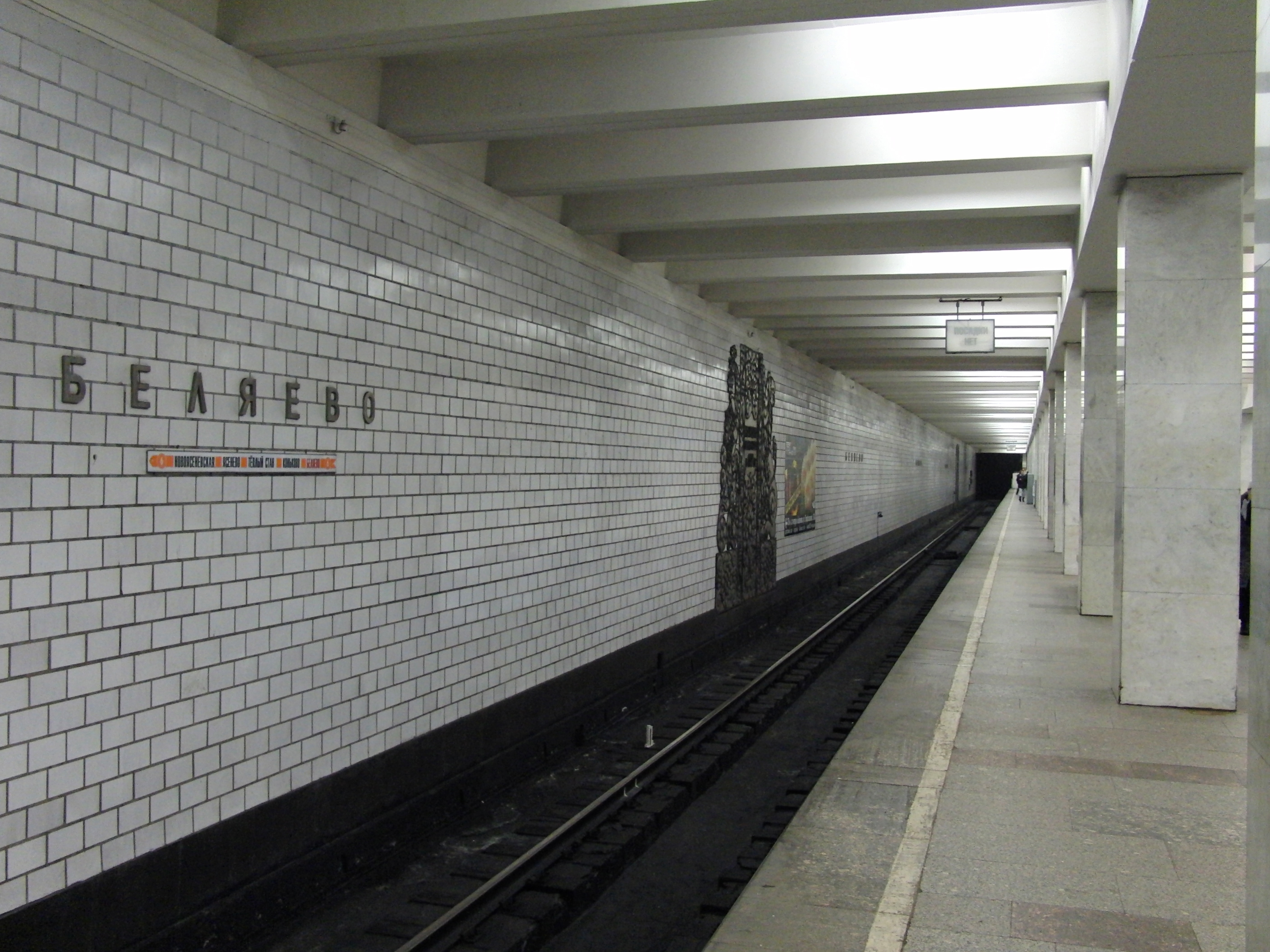 Belyayevo (Беляево)